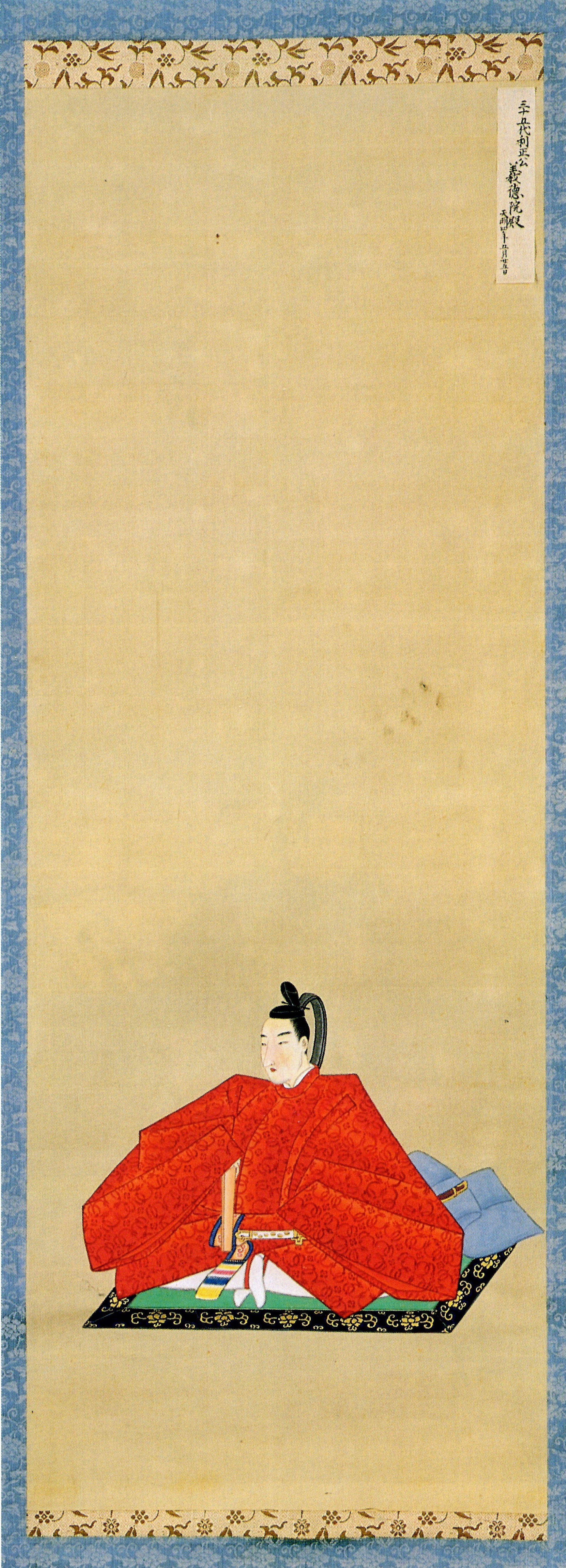 南部利正の肖像。